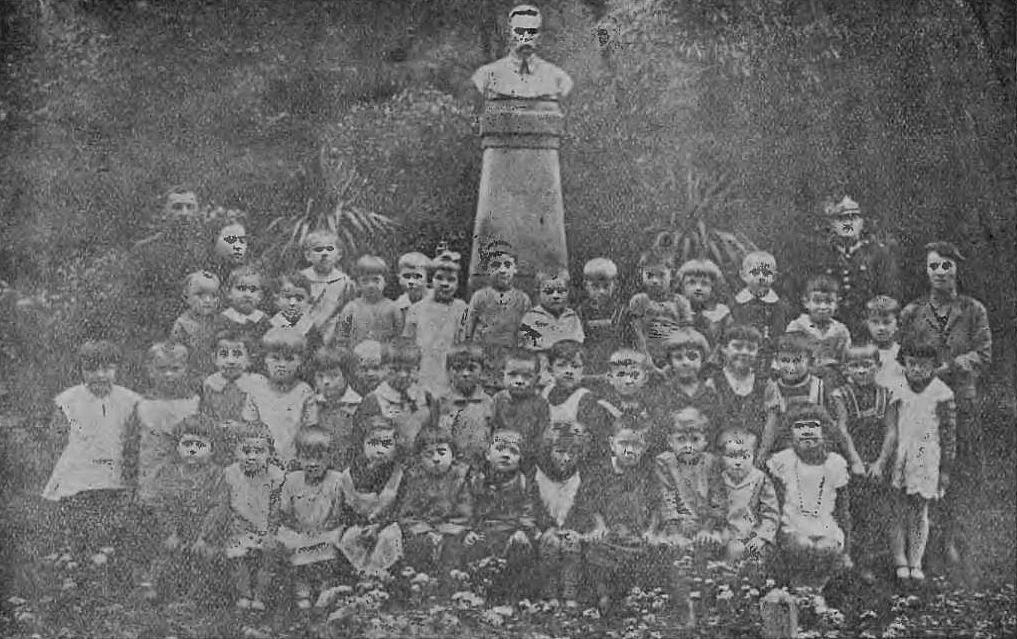 Pomnik Józefa Piłsudskiego w Przemyślu (pierwszy, -1933)